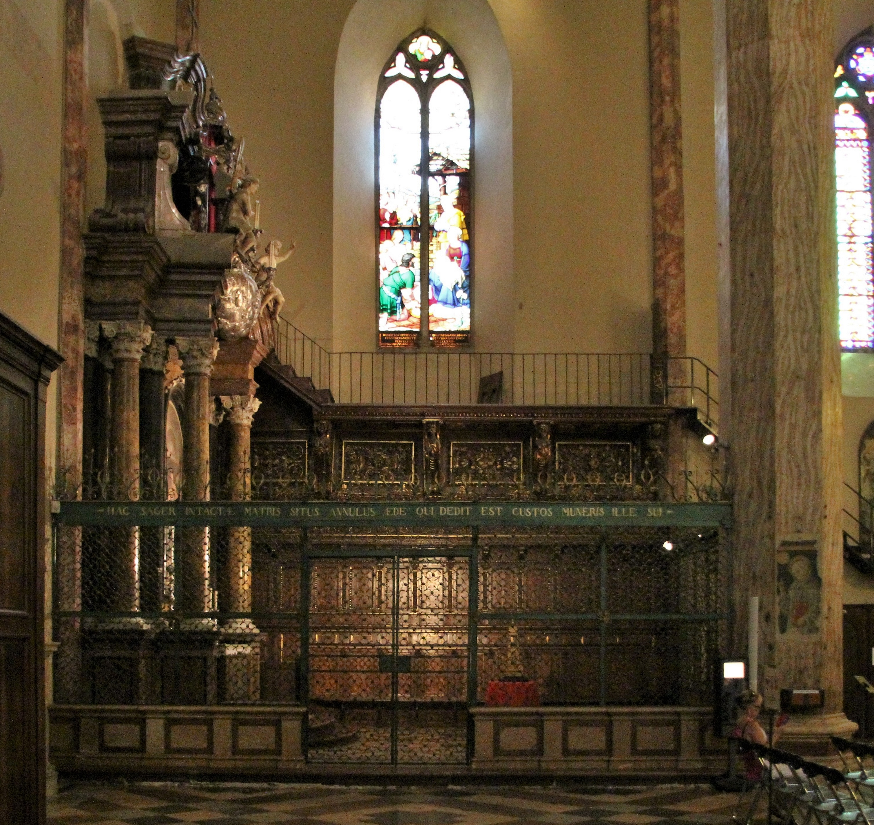 Ecclesia Cathedralis Perusiana, Capella Sancti Josephi, Inscriptio: HAC SACER INTACTAE MATRIS SITUS ANNULUS AEDE QUI DEDIT EST CUSTOS MUNERIS ILLE SUI.